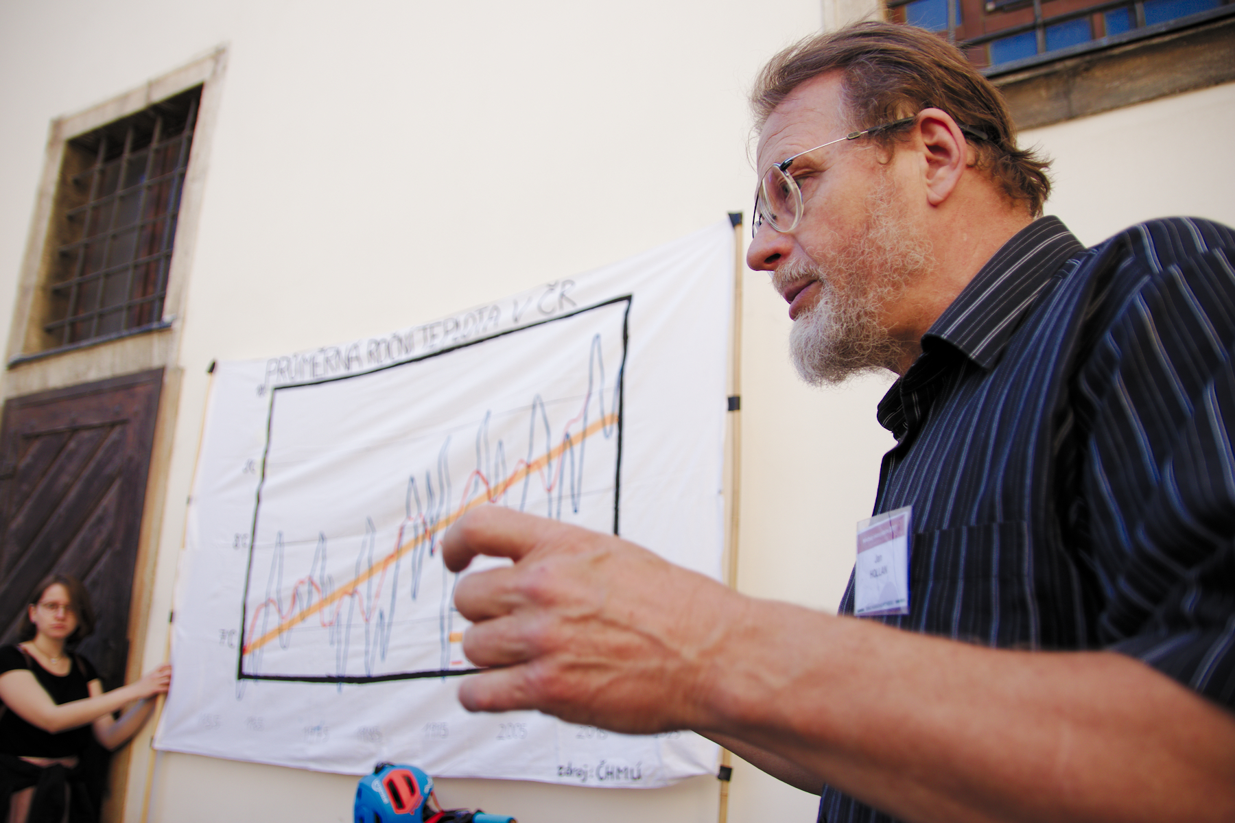 "Jan Hollan" School strike for Climate Brno, Czech rep. May 24, 2019 Stredoškolská stávka za klima Brno 24. 5. 2019